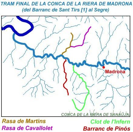 Mapa del tram final de la Riera de Madrona en el qual s'hi ha destacat el Clot de l'Infern, el Barranc de Pinós, la Rasa de Martins i la Rasa de Cavallolet.